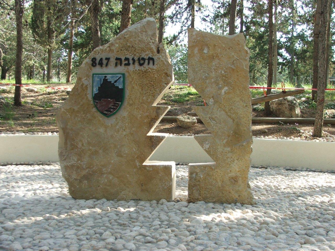 אנדרטת חטיבת מרכבות הפלדה 847 בפארק העוצבות בלטרון